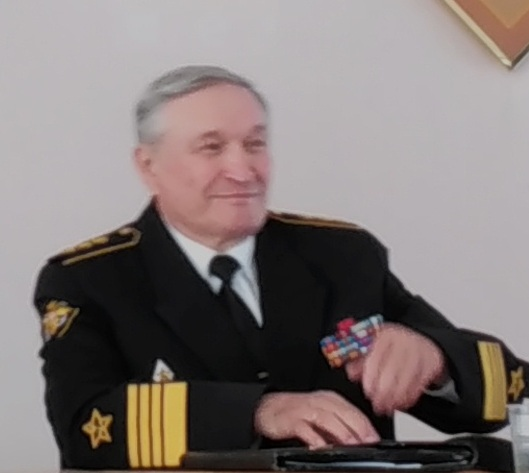 адмирал Фёдоров Виктор Дмитриевич 31 марта 2016 в Краснодаре